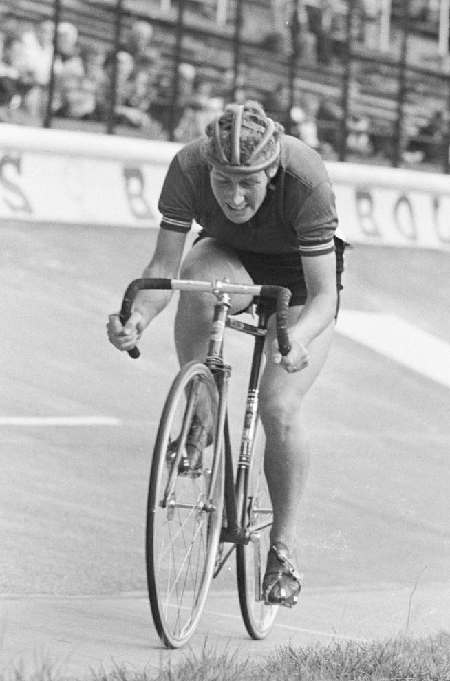 WK Wielrennen, Beryl Burton